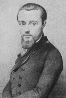 Portret van Pieter Frans van Kerckhoven (Antwerpen, 10 november 1818 - Antwerpen, 1 augustus 1857) door een onbekende auteur.